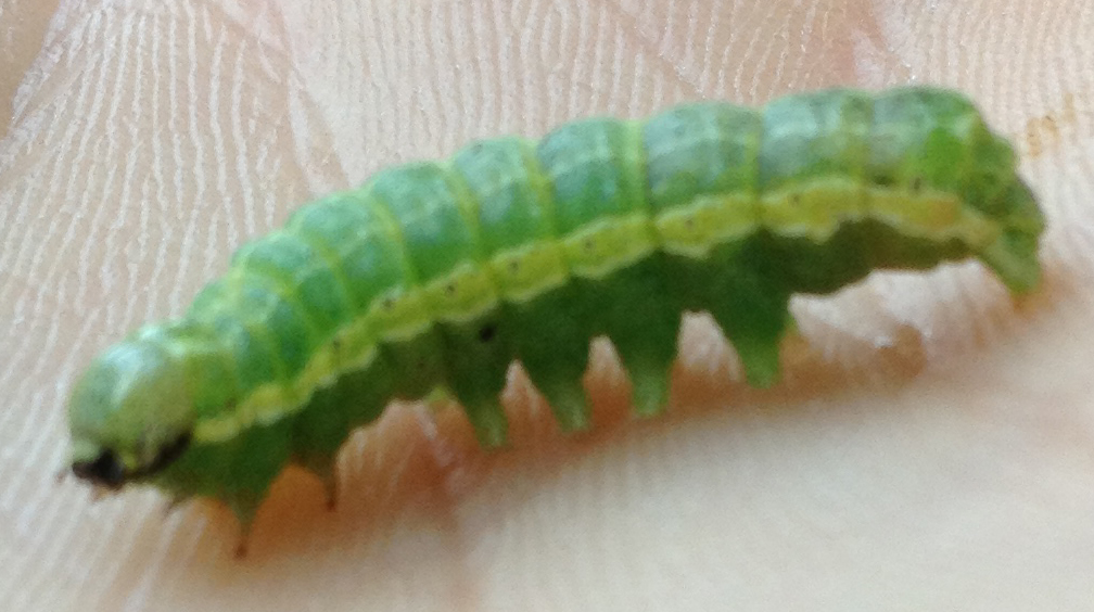 Green variant caterpillar of Orthosia cruda